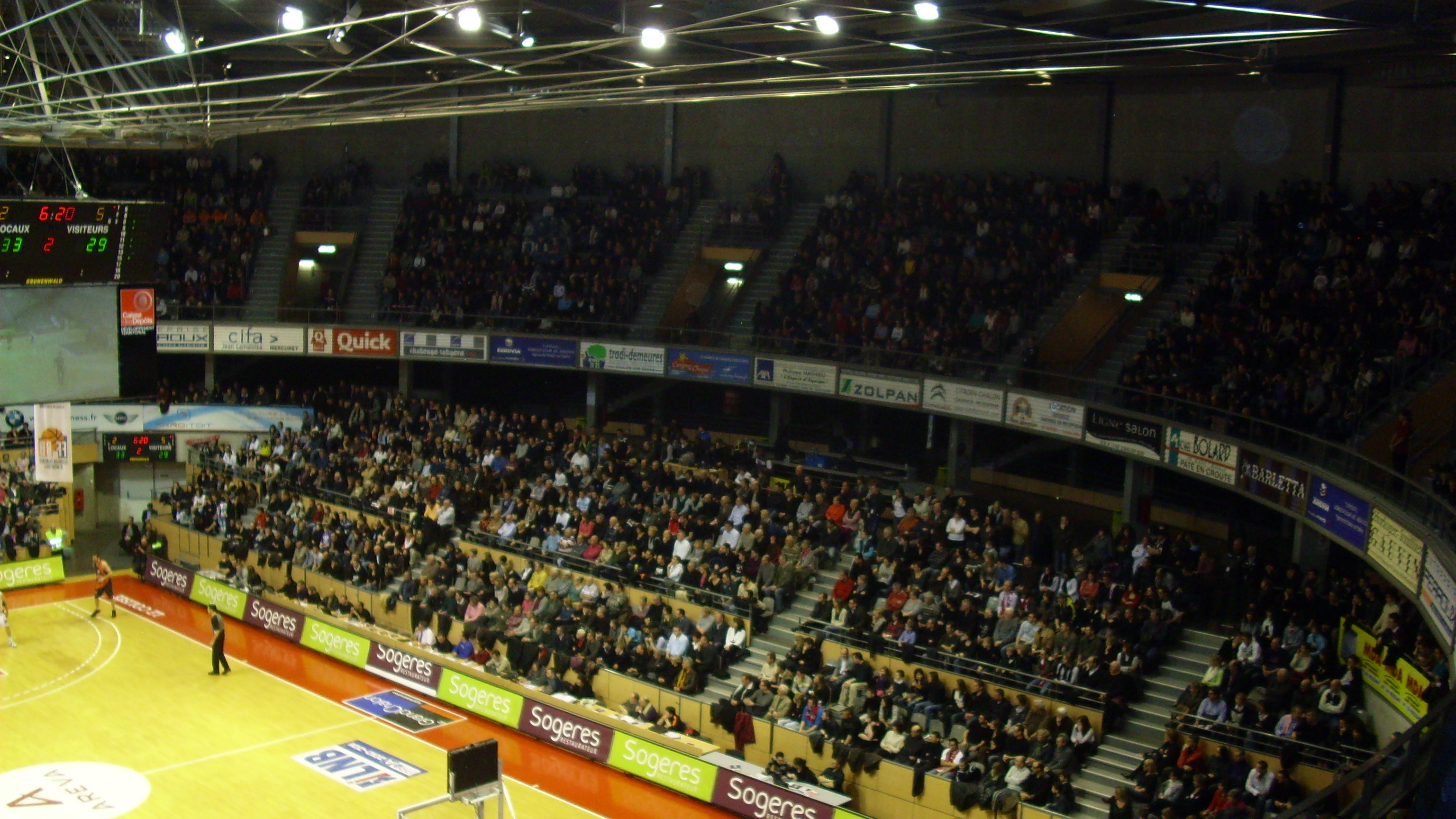 Le Colisée : Match de l'Elan Chalon contre Le Mans lors de la saison de Pro A 2010-2011 (19-02-11)